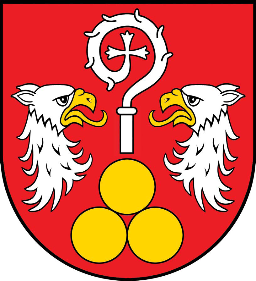 Herb gminy Potok Wielki.